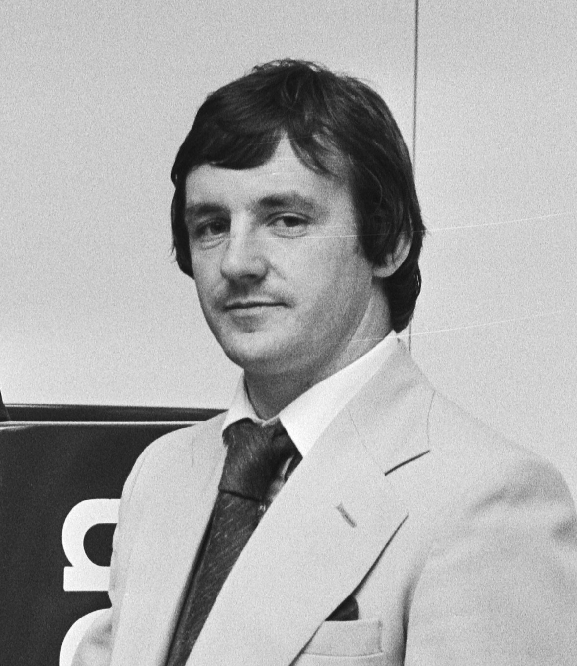 Collectie / Archief : Fotocollectie Anefo Reportage / Serie : [ onbekend ] Beschrijving : Aankomst Glasgow Rangers op Schiphol, tegenstander PSV; nr. 3 v.l.n.r. de spelers, Gordon Smith, Johnstone en Miller (kop) Datum : 30 oktober 1978 Locatie : Noord-Holland, Schiphol Trefwoorden : sport, voetbal Persoonsnaam : Glasgow Rangers, Johnstone Instellingsnaam : PSV Fotograaf : Croes, Rob C. / Anefo Auteursrechthebbende : Nationaal Archief Materiaalsoort : Negatief (zwart/wit) Nummer archiefinventaris : bekijk toegang 2.24.01.05 Bestanddeelnummer : 929-9700